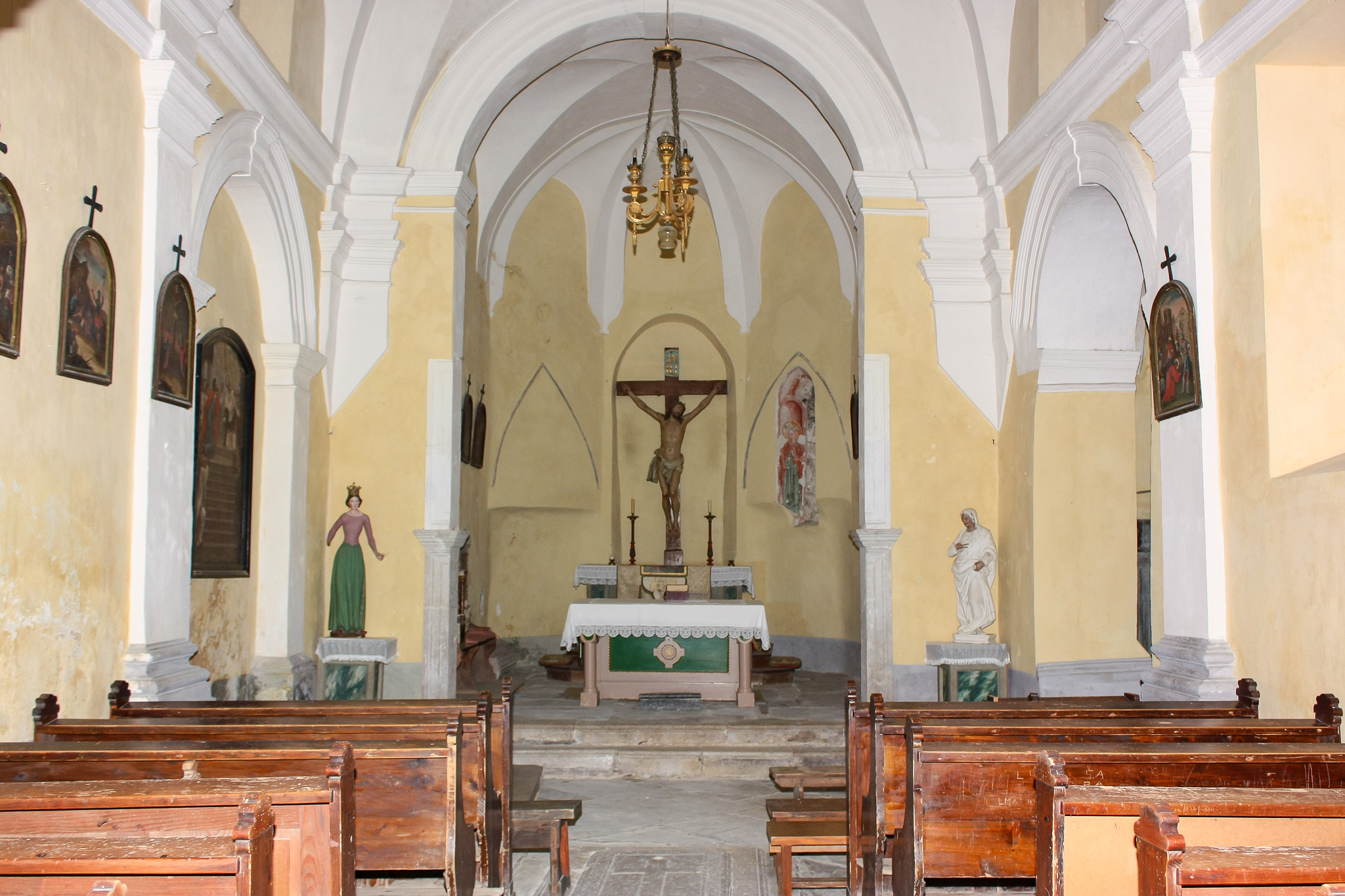 Cerkev Sv. Križa Vrhpolje